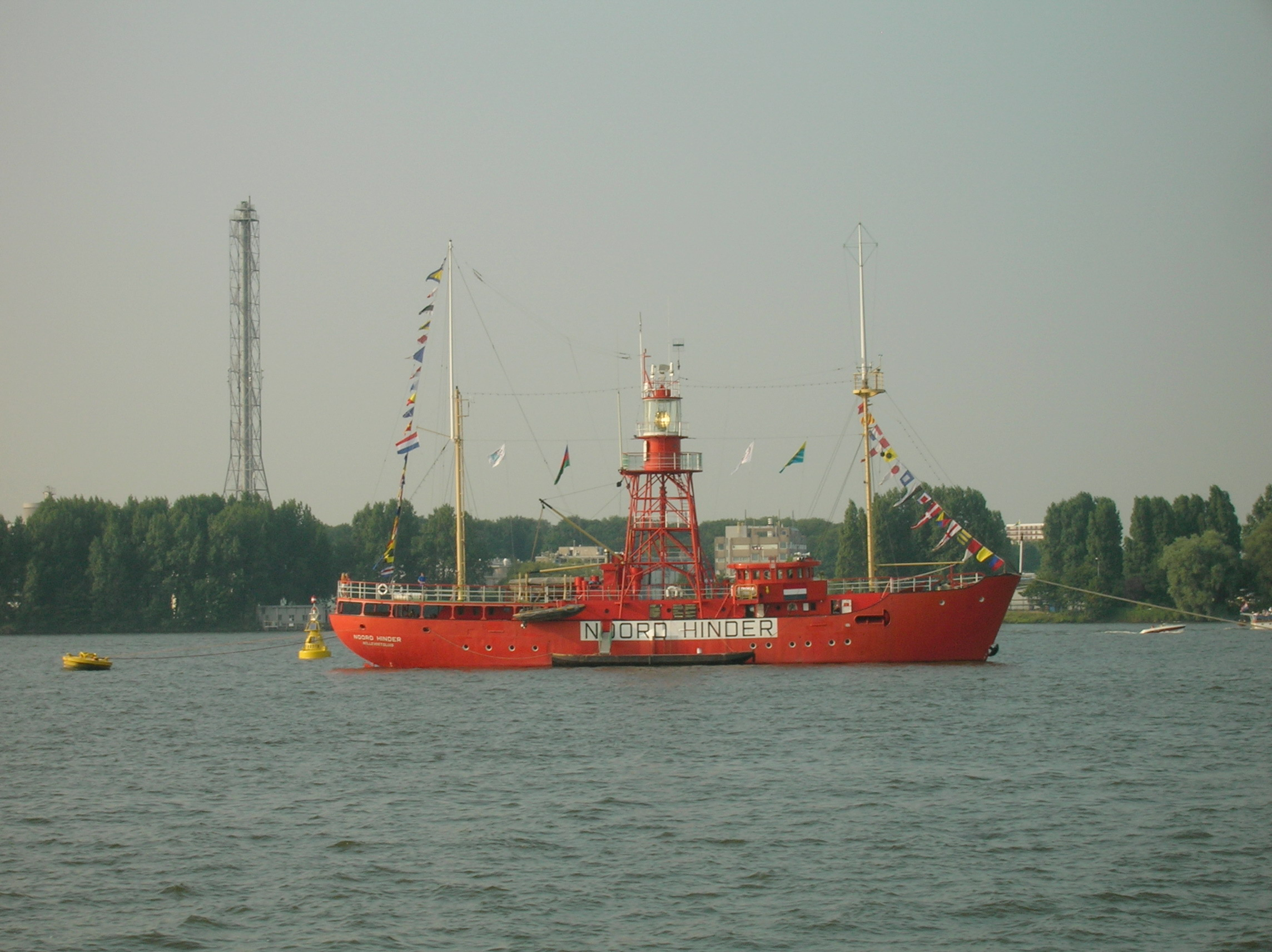 Foto van het Lichtschip "Noord Hinder", genomen tijdens de SAIL2005 in Amsterdam door SanderK. Picture of the Lightvessel / lightship "Noord Hinder". Taken during SAIL2005 in Amsterdam (The Netherlands) by SanderK.